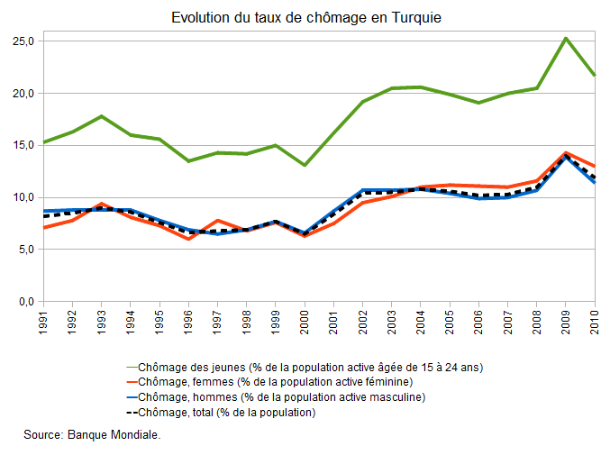 Evolution du taux de chomage en Turquie selon la Banque Mondiale